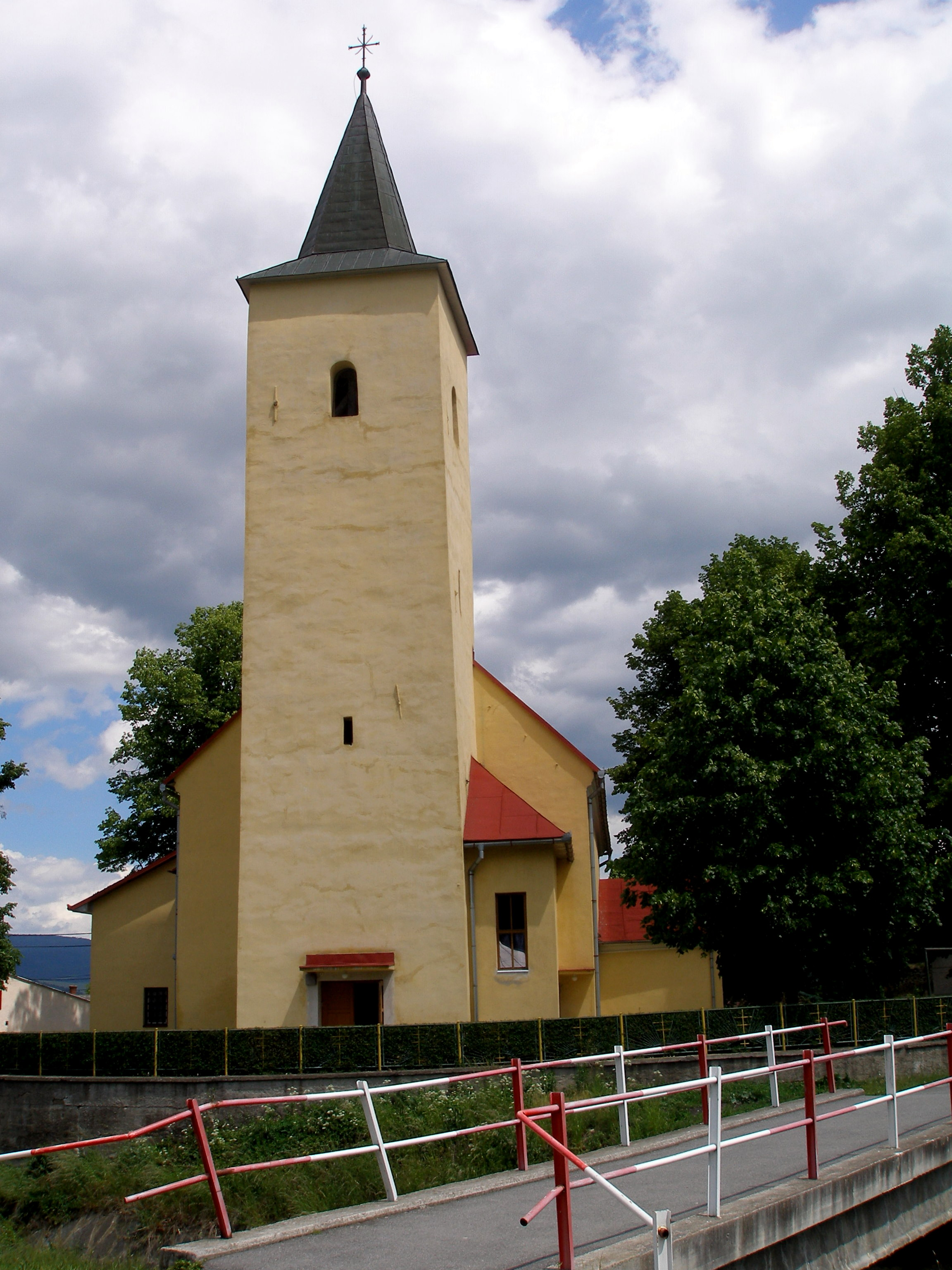 Obec Dubovica okres Sabinov